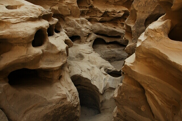 عکسی از تنگه چاه کوه در جزیره زیبای قشم . این تنگه در محدوده ژئوپارک جهانی قشم قرار دارد